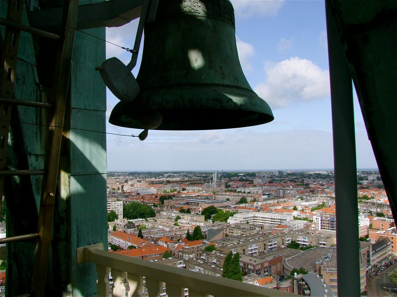 Den Haag In 1956 werd het carillon uitgebreid naar 51 klokken door het bedrijf Koninklijke Eijsbouts uit Asten. Van de 51 klokken hangen er 47 in de spits van de toren. Dat is duidelijk te zien vanaf de straat. De 4 grote klokken hangen op de ‘luidzolder’, een paar etages onder de spits van de toren. De huidige beiaardier, Heleen van der Weel, speelt al sinds 1975 op het carillon. Zij loopt een paar maal per week de trappen op. Tussen de luidzolder en de spits staat het klavier waarmee het carillon met de hand bespeeld kan worden. en strooit dan vrolijke klanken uit over Den Haag.